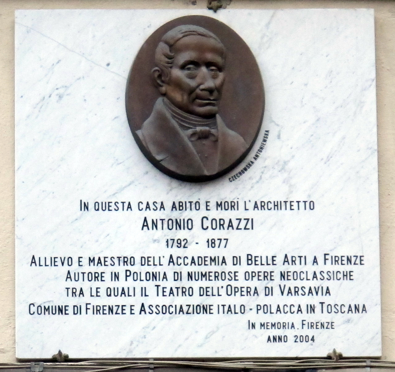 Via dell'agnolo 61, Casa dei Minimi, targa antonio corazzi 2